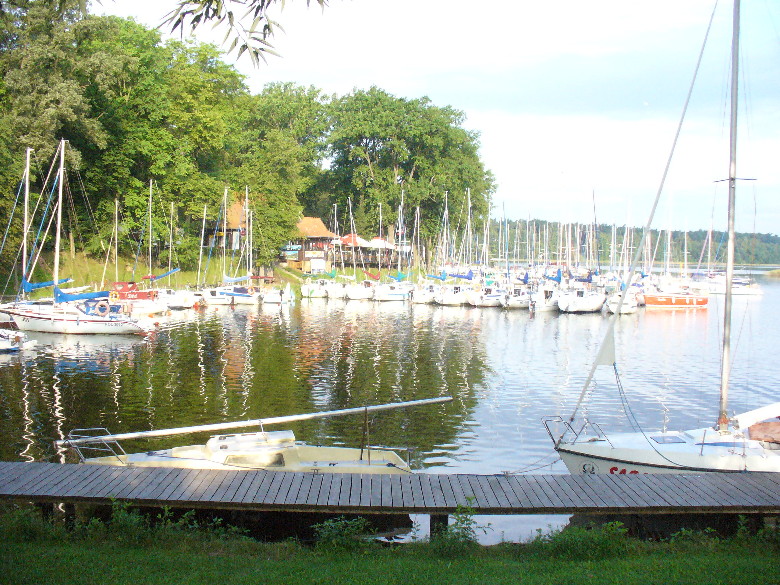 W Iławie nad Jeziorakiem